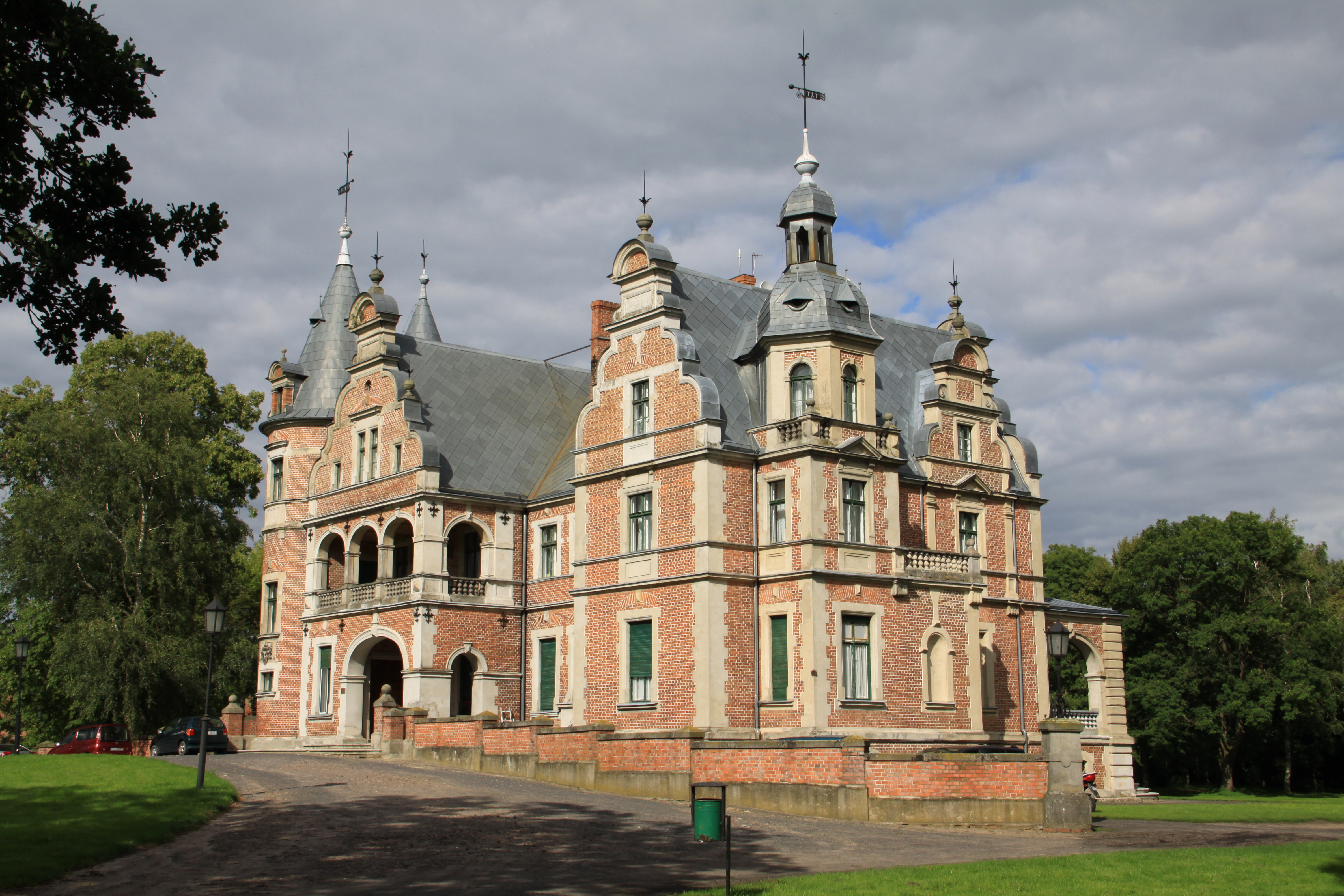 Kobylniki, dwór, 1886